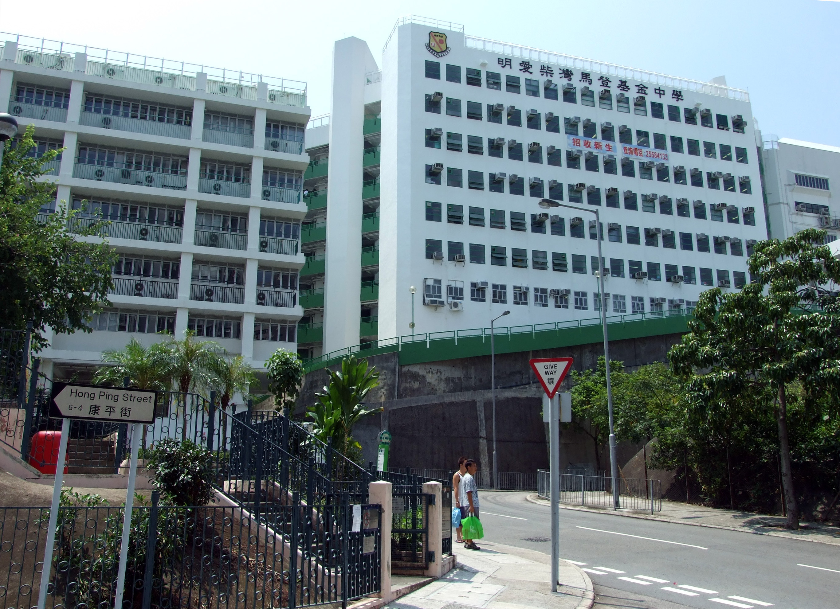 中文（香港）: 明愛柴灣馬登基金中學